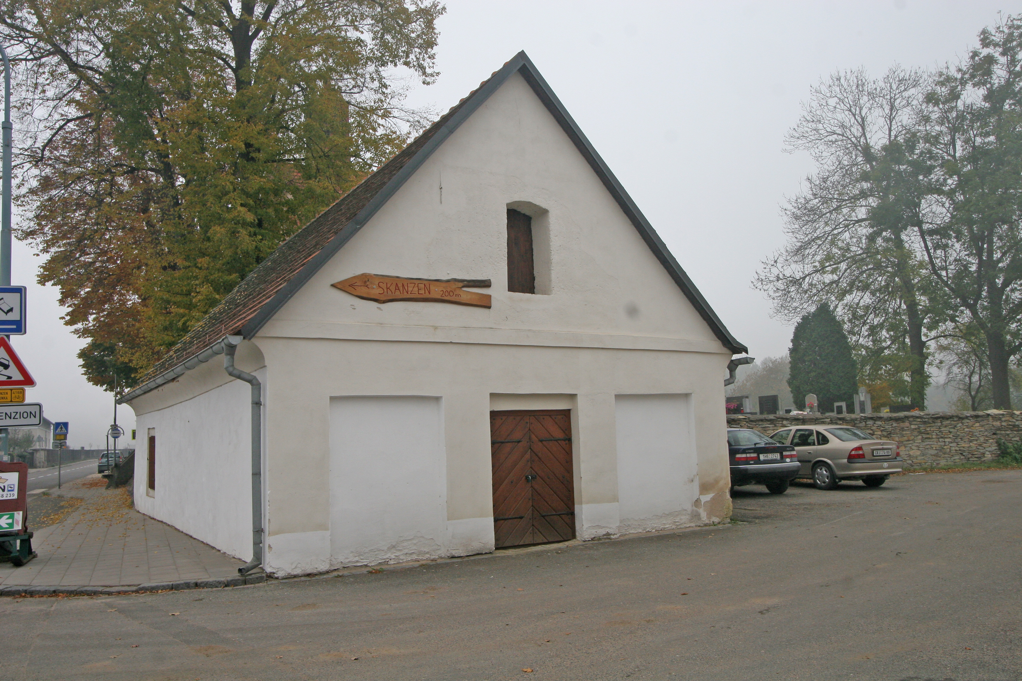 Jiná výrobní stavba - lednice (sklad ledu) (Krňovice), u kostela Nanebevzetí Panny Marie, Krňovice